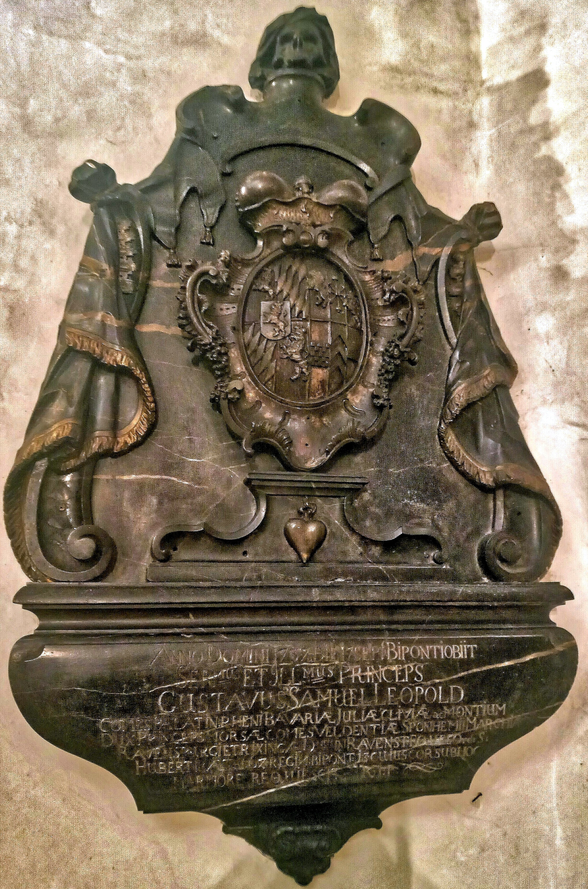 Herzgrab Herzog Gustav Samuel Leopold von Pfalz-Zweibrücken-Kleeburg (+ 1731), kath. Kirche Meisenheim